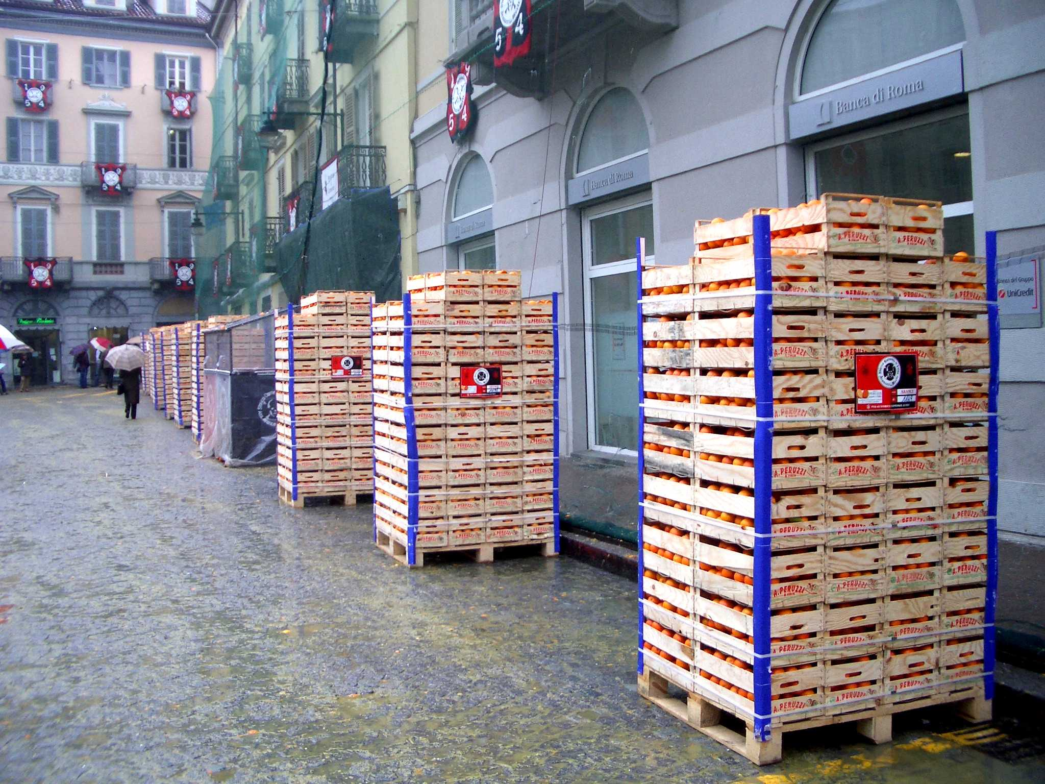 Carnival of Ivrea, Battaglia delle arance, munizioni per la seconda giornata (Orange-battle, "munitions for the second day fight)